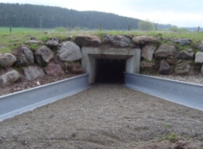 Amphibientunnel bei Furtwangen, Deutschland